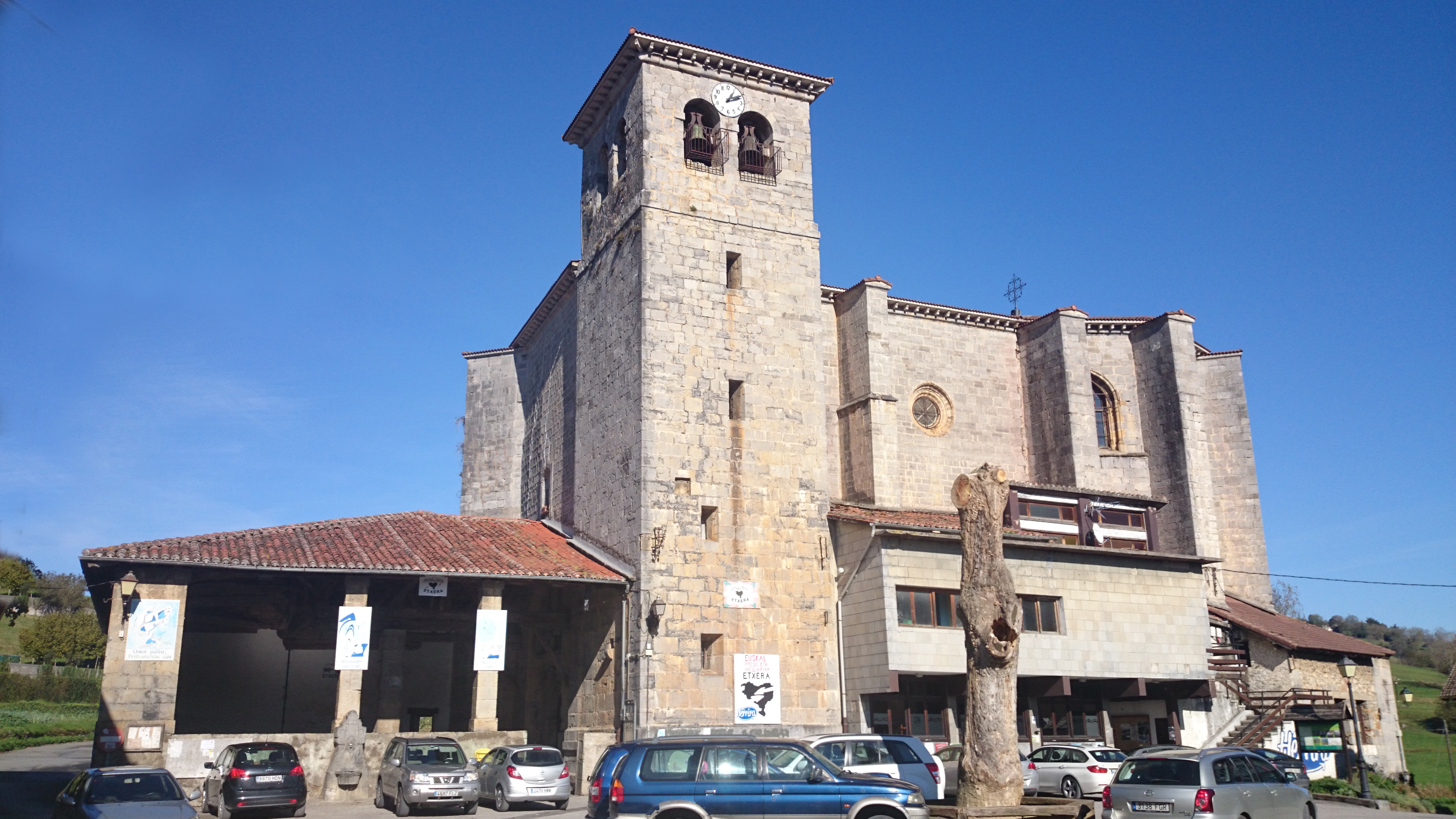 Zizurkilgo Donemiliaga parrokia-eliza